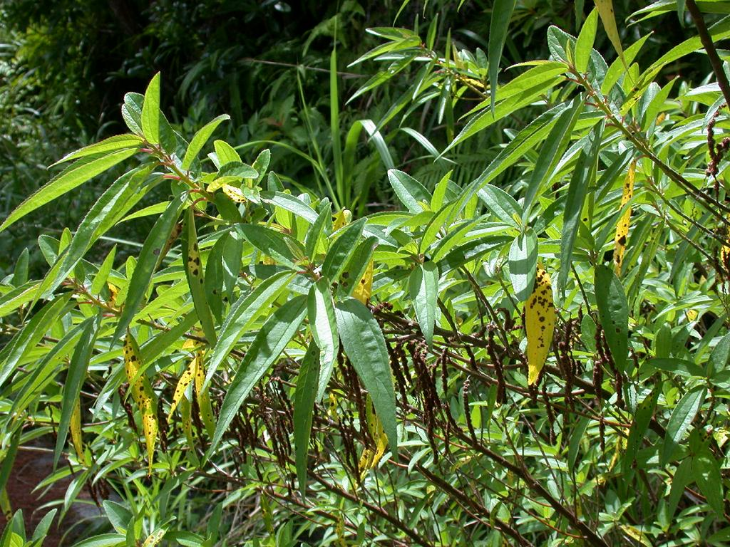 Boehmeria densiflora：ヤマギバモクマオ 2006/08/11 沖縄本島北部：Okinawa Island, Japan